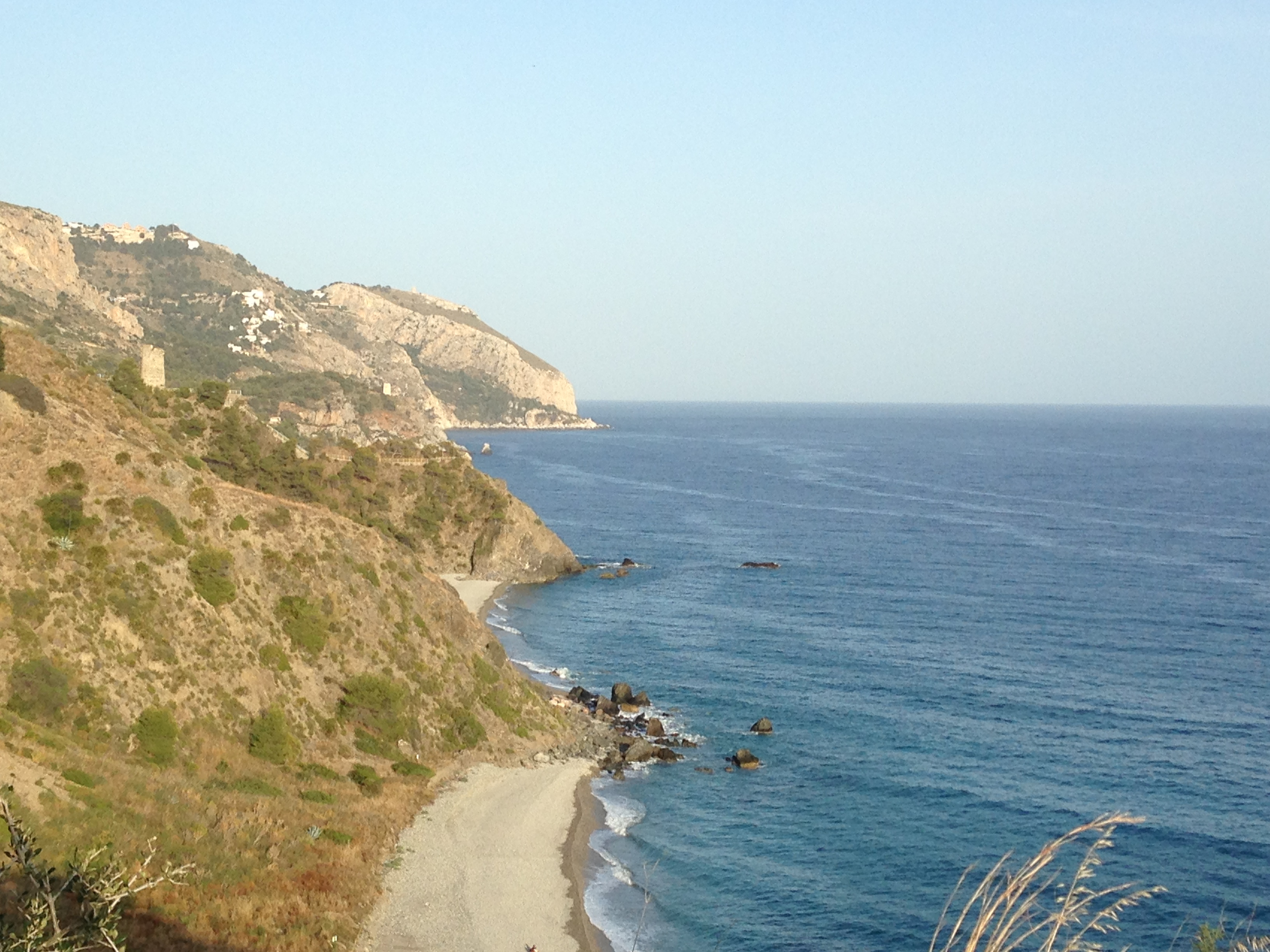 Foto de los Acantilados de Maro-Cerro Gordo hecha cerca de la Cala de Los Pinos por la tarde a contraluz This is a photography of a Special Area of Conservation in Spain with the ID: ES6170002. Natura2000 entry, EEA entry